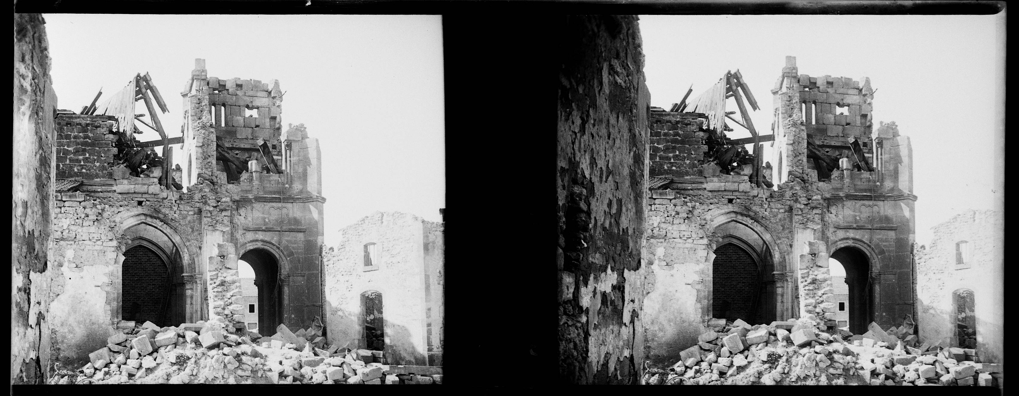 Vue des ruines de l'église de Louppy-le-Château (Meuse), suite à un bombardement. 1916. Guerre 1914-1918.